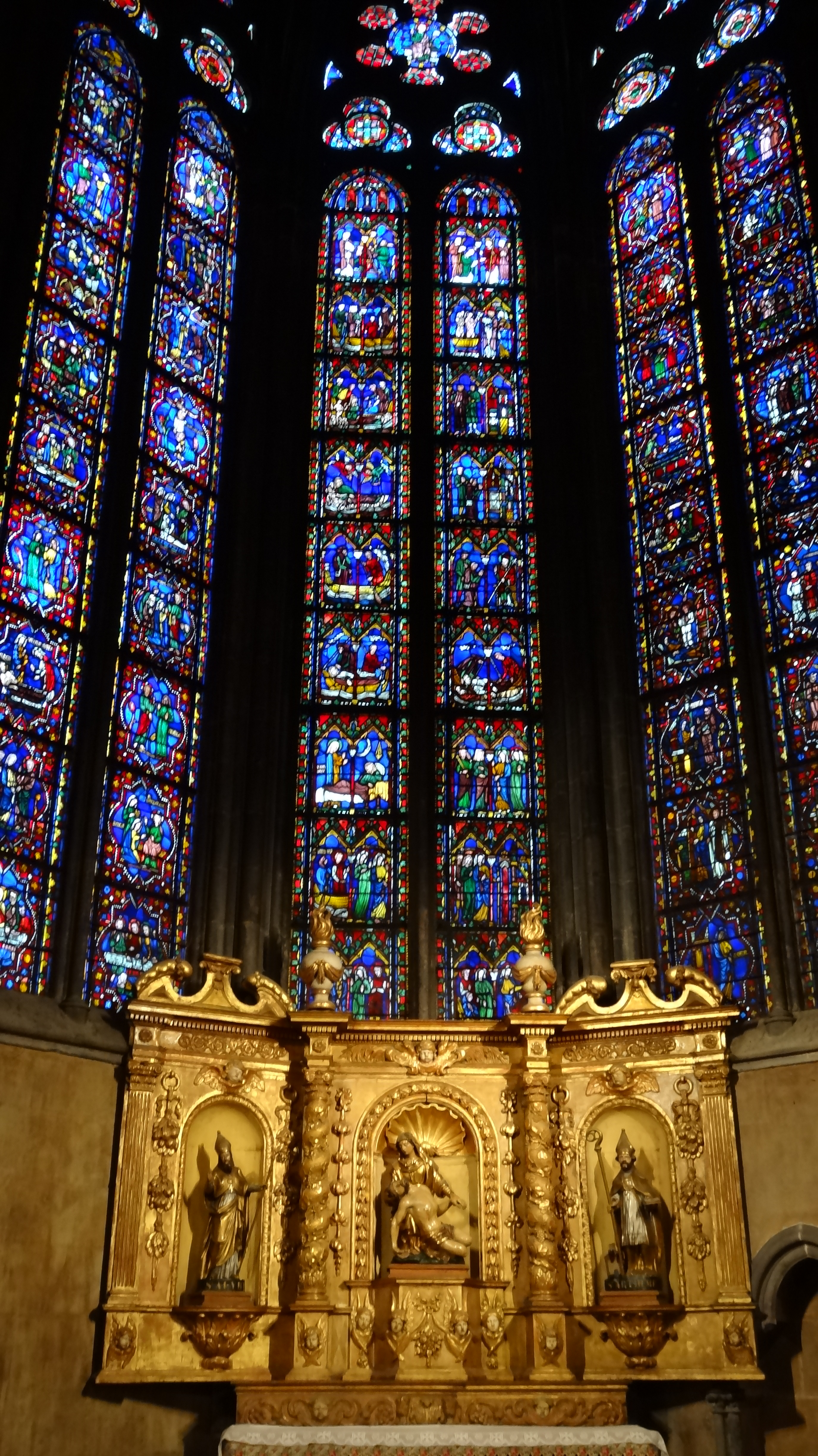 Cathédrale Notre-Dame-de-l'Assomption de Clermont - Сhapelle Sainte Madeleine, 3 verrières relatant la Vie de Sainte Marie-Madeleine.